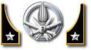 Mostrine e fregio del 3° Missili